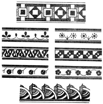 التناظر والتكرار في الزخرفة